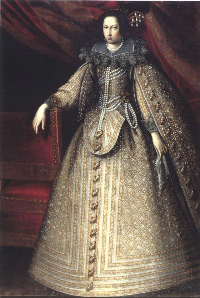 Isabella diventò mai duchessa in quanto morì prima che il marito Alfonso III d'Este diventasse duca.